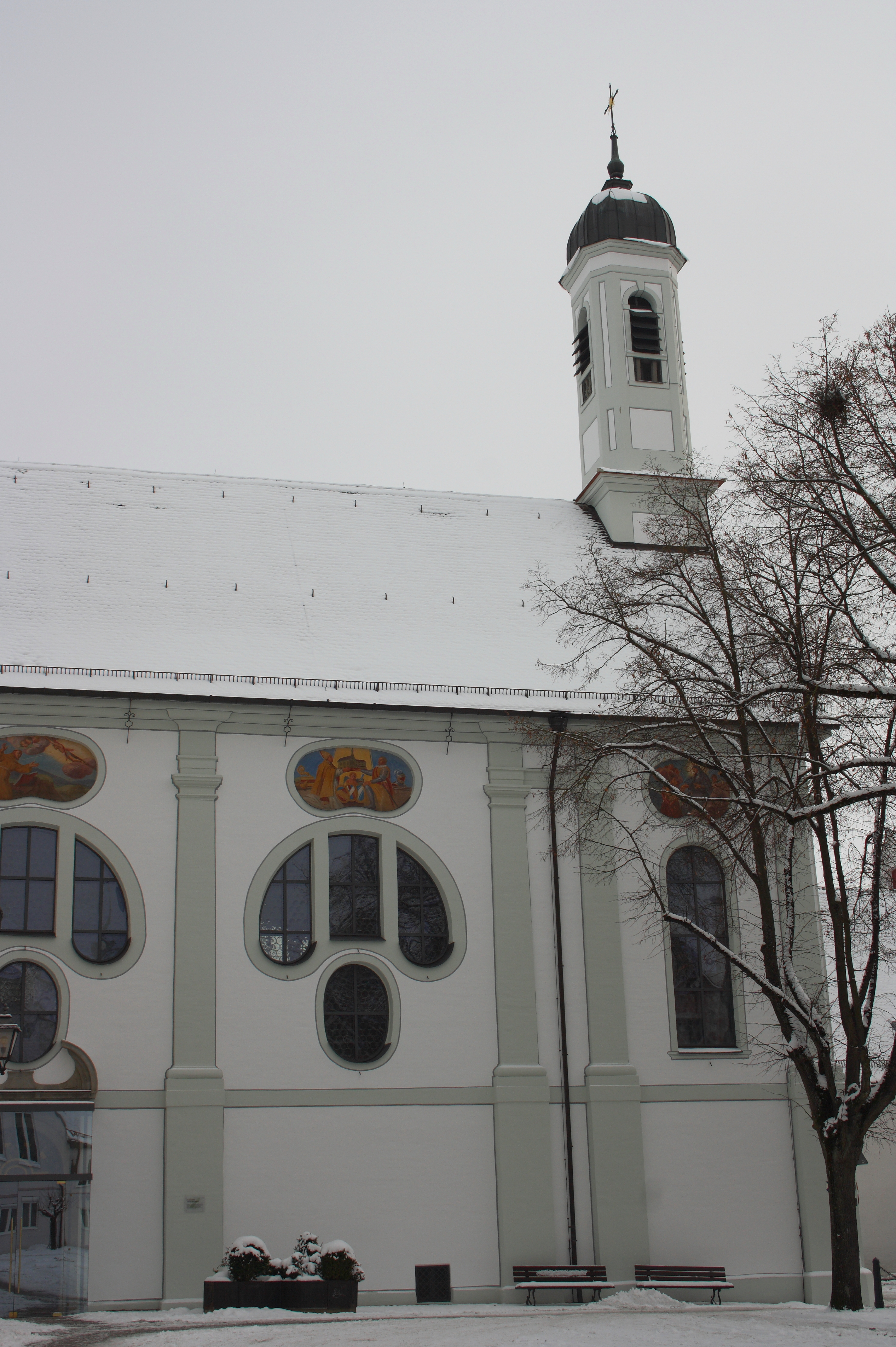 Klosterkirche Mariä Himmelfahrt der Dillinger Franziskanerinnen in Dillingen an der Donau, Ansicht von Westen